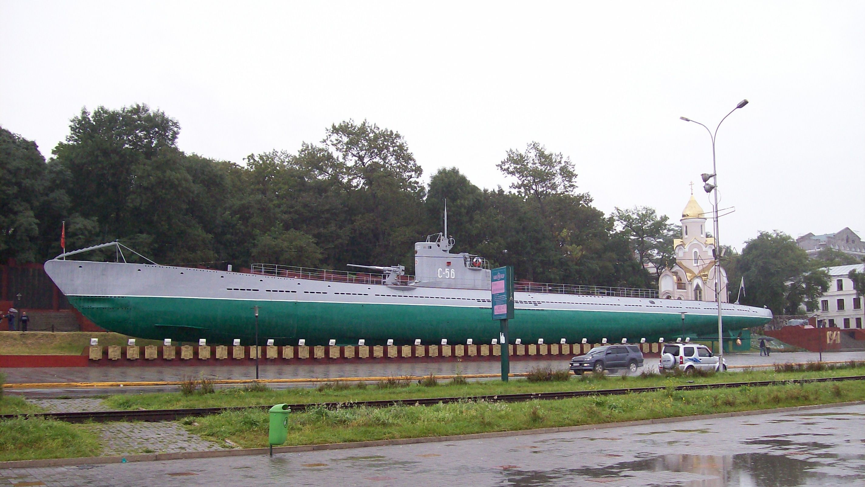 Мемориальный комплекс на Корабельной набережной